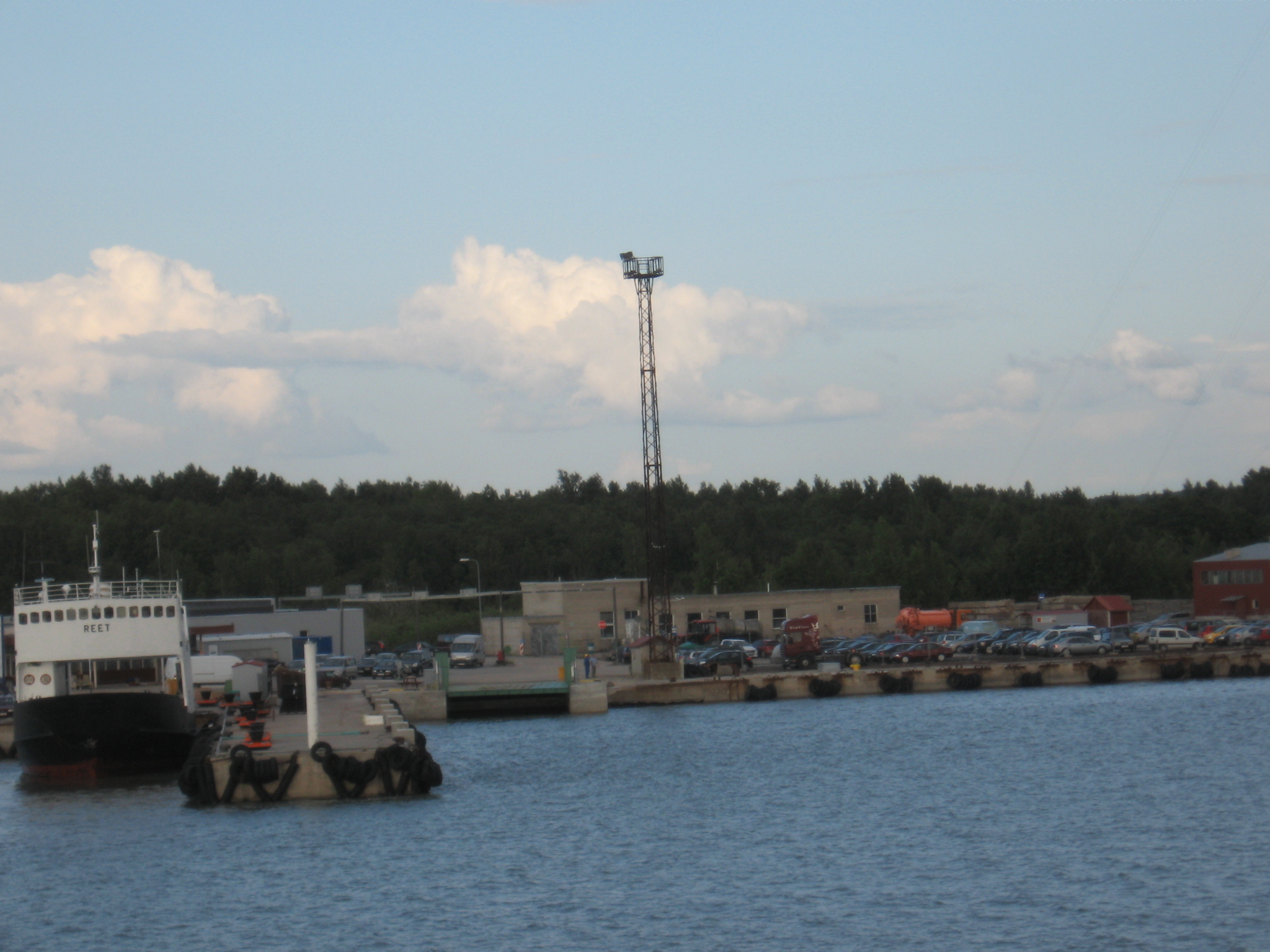 Rohuküla sadam, Rohuküla, Ridala vald, Lääne maakond